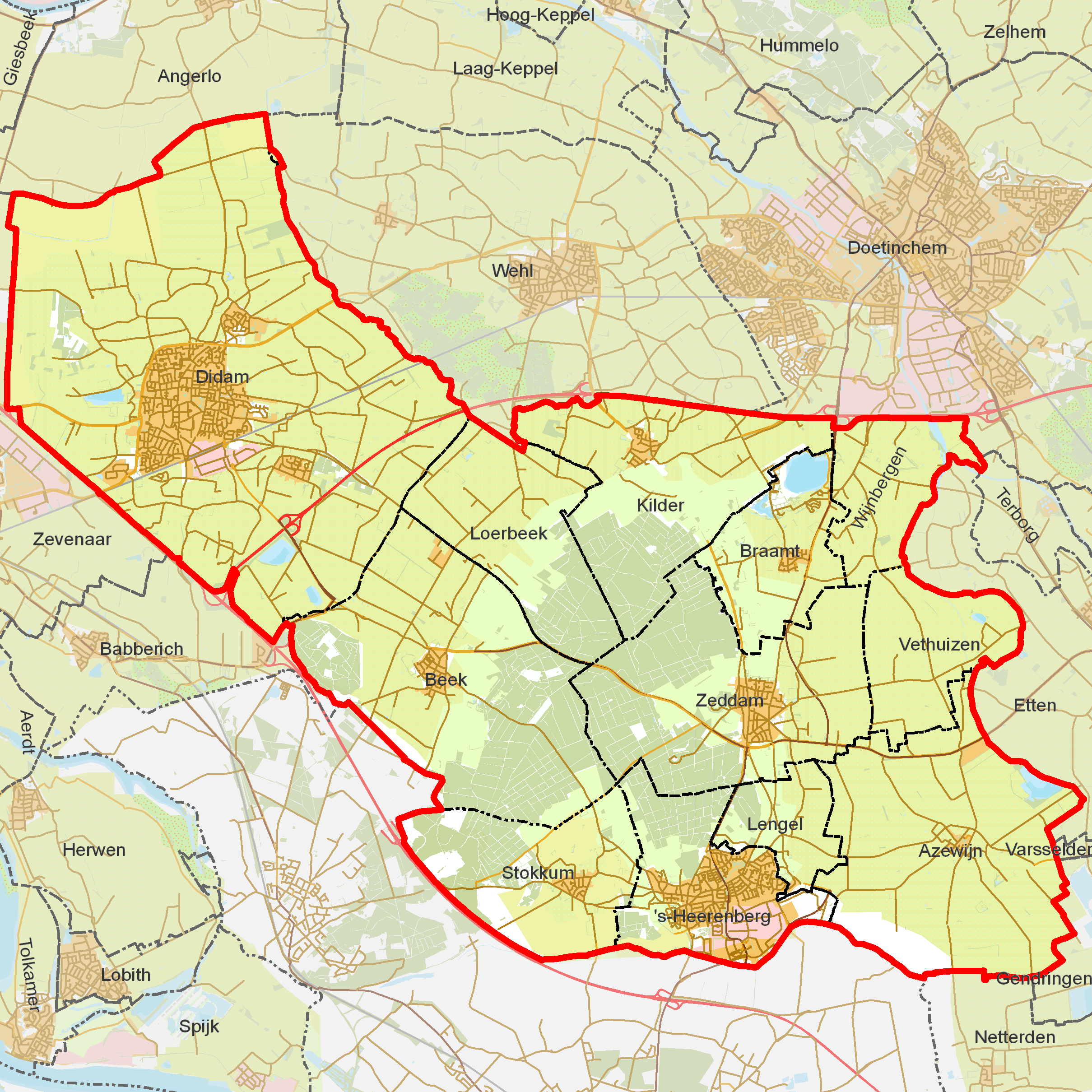 BAG woonplaatsen - Gemeente Montferland.png